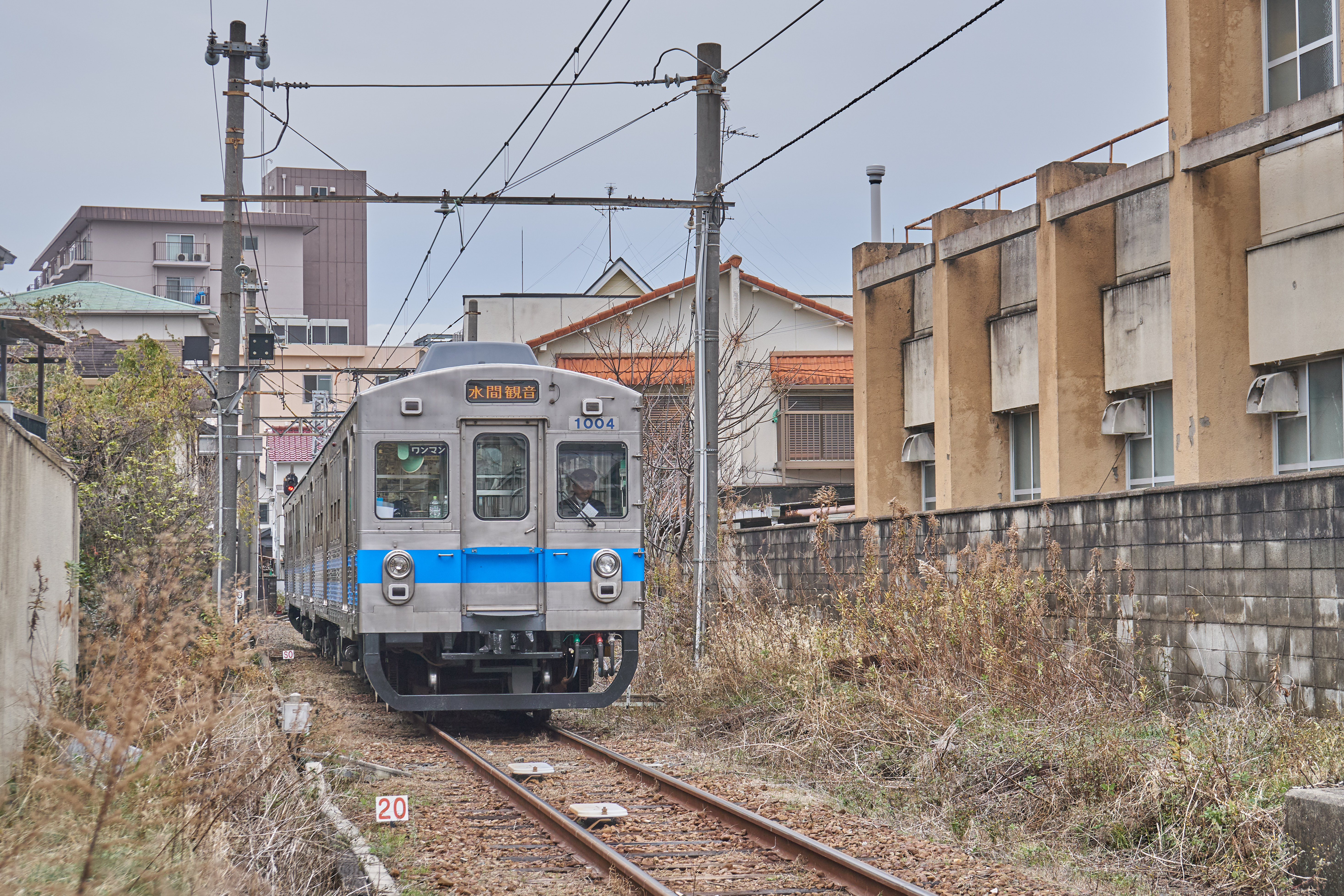 Umizuka Station